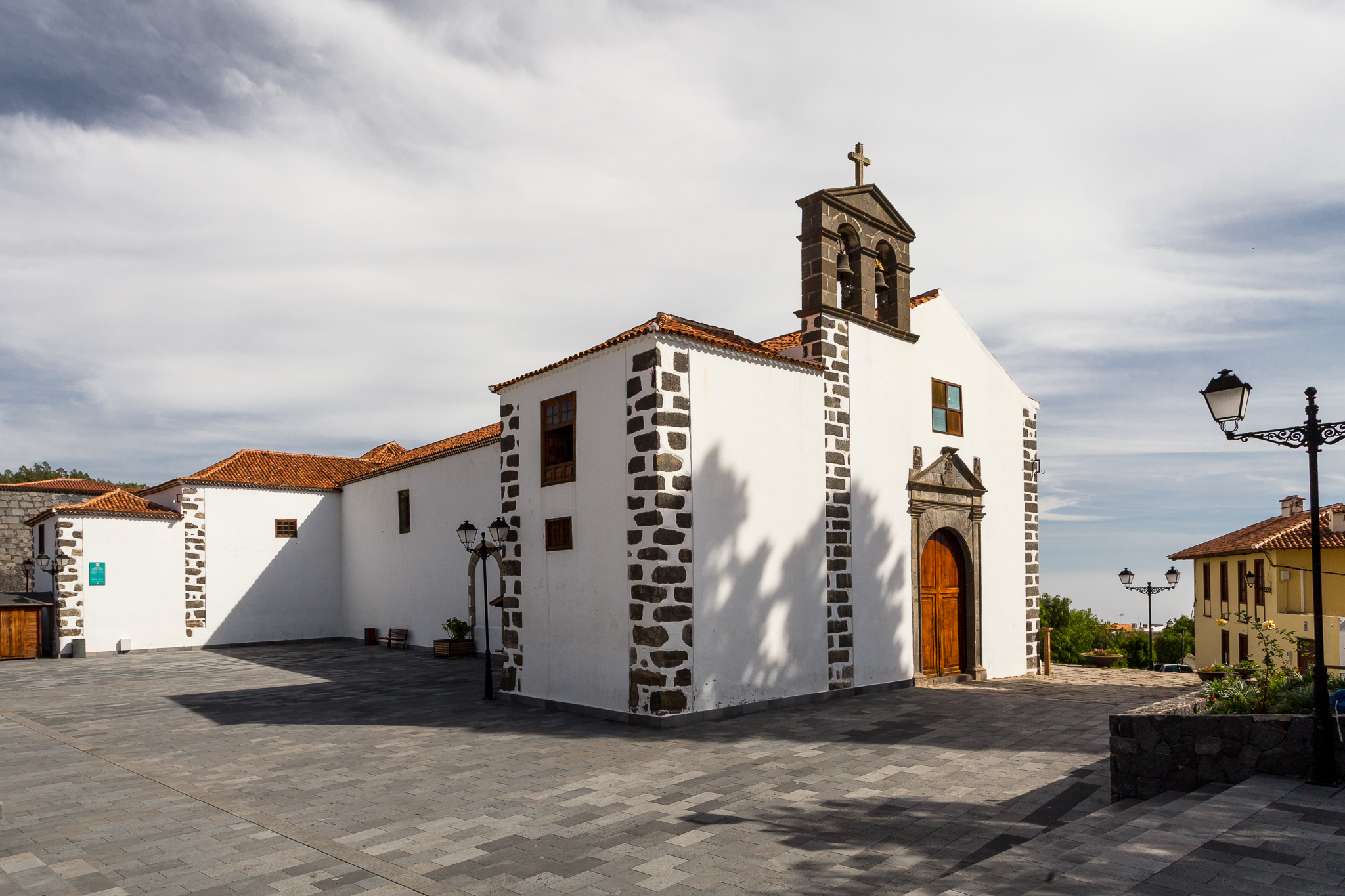 Parroquia Matriz de San Pedro Apóstol, Vilaflor